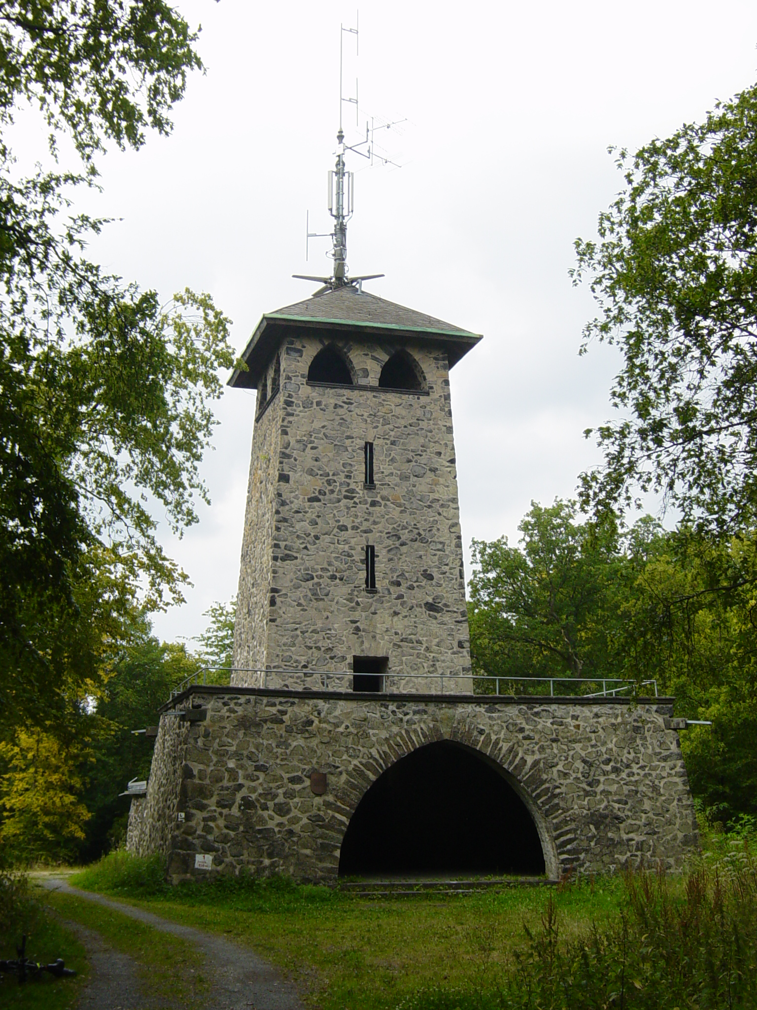 Stoppelberg bei Wetzlar, Aussichtsturm 1929